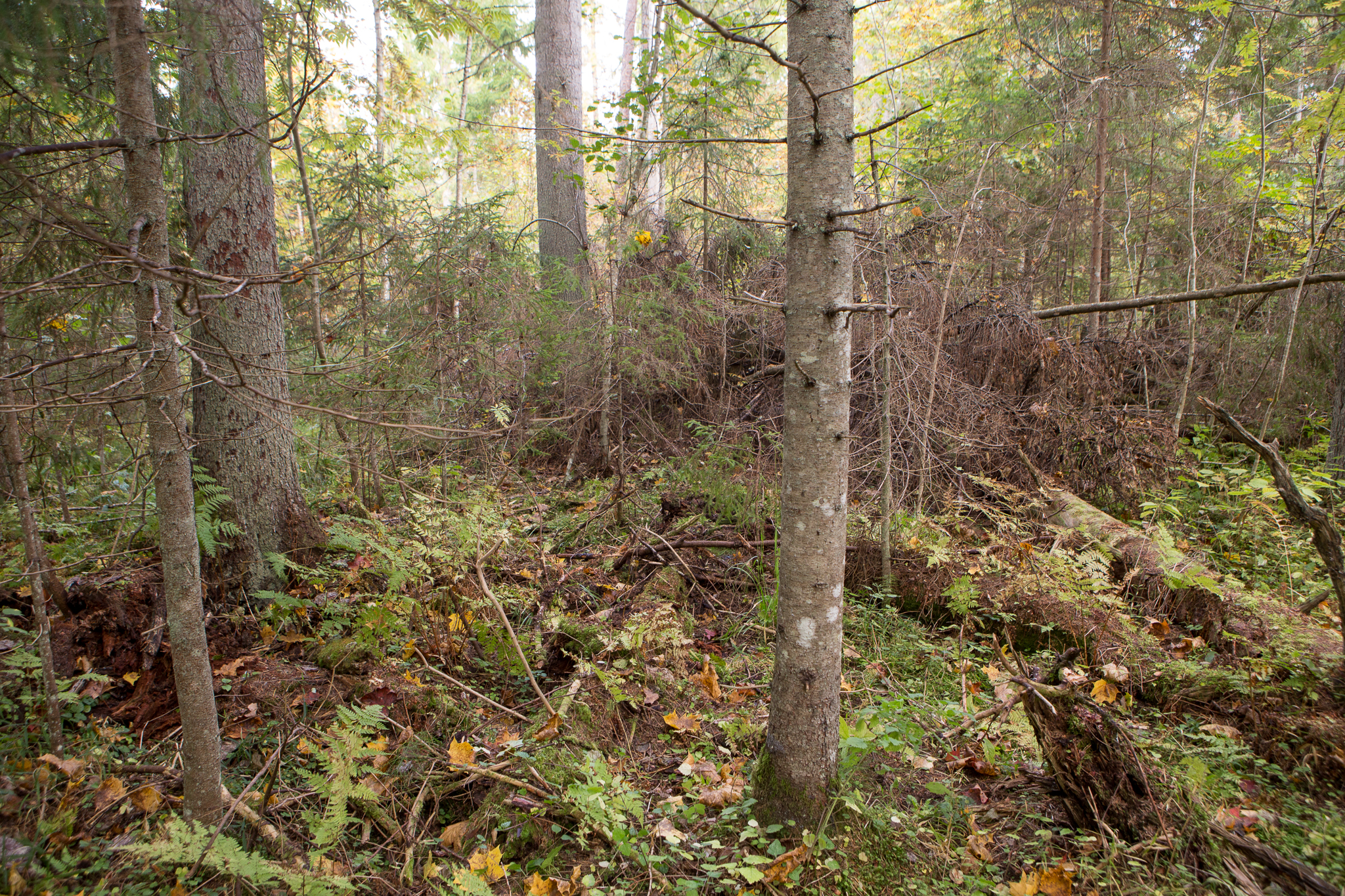 Pseudotomentella mucidula kasvukoht Järvselja ürgmetsas